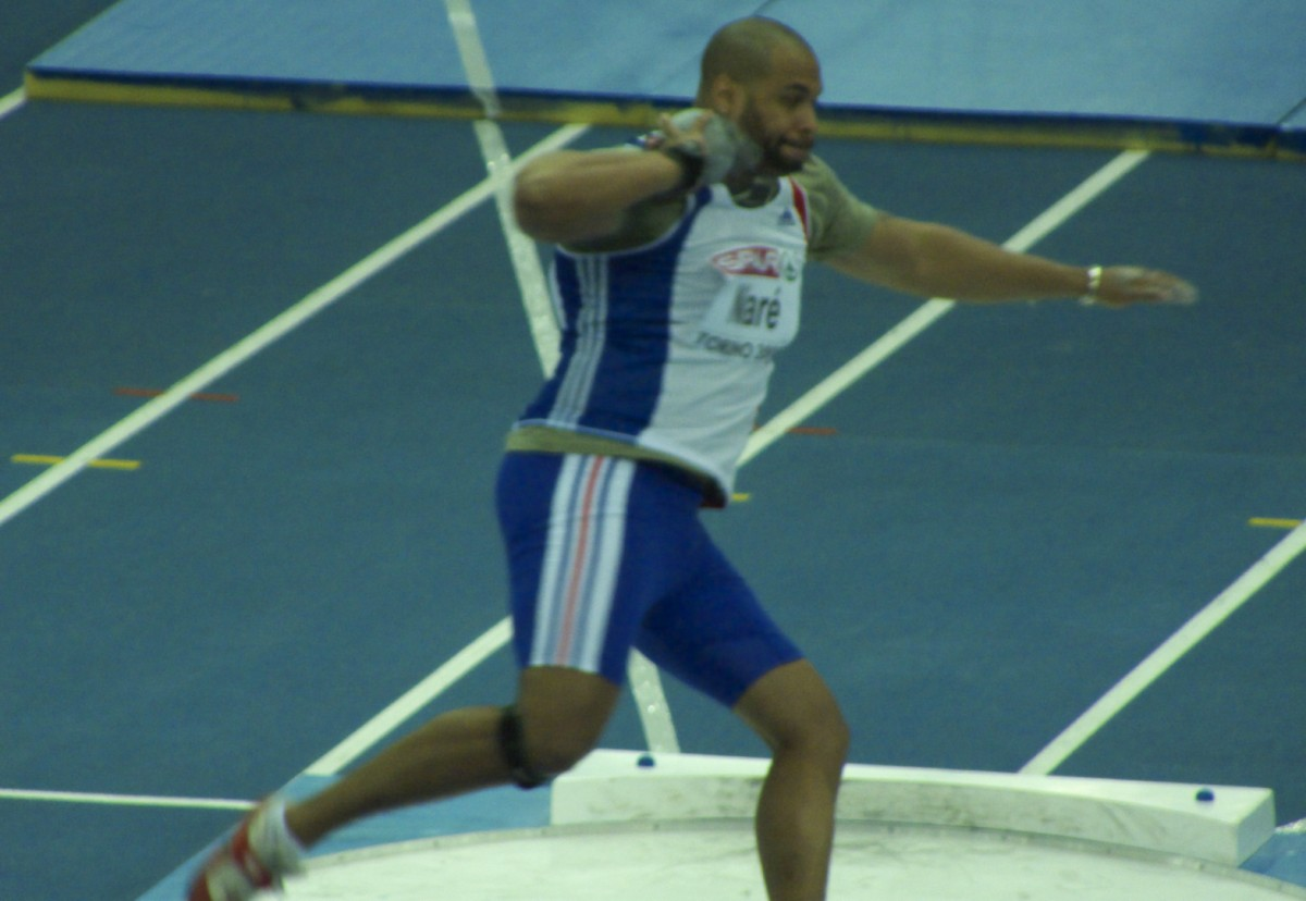 Yves Niare ai campionati europei indoor di Torino 2009